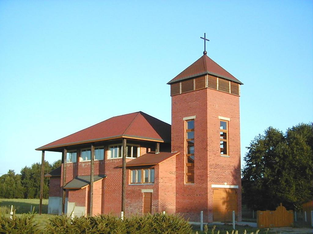 Bārtas katoļu baznīca 2002-08-03